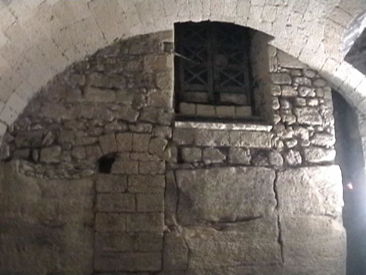 Hypogeum De Beaumont Bonelli Bellacicco at Taranto, Italy